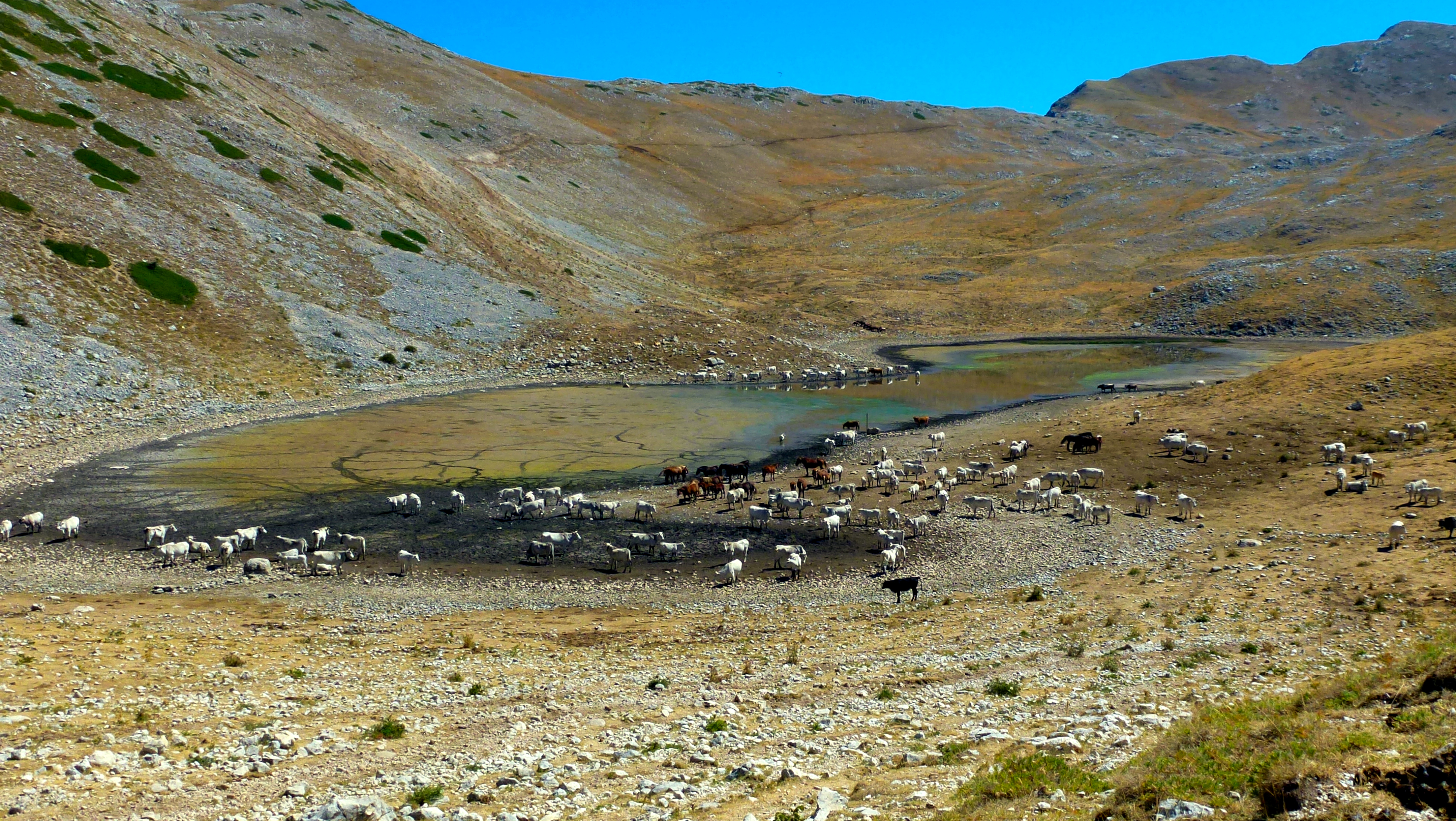 Estate 2017 siccità e prosciugamento del Lago della Duchessa